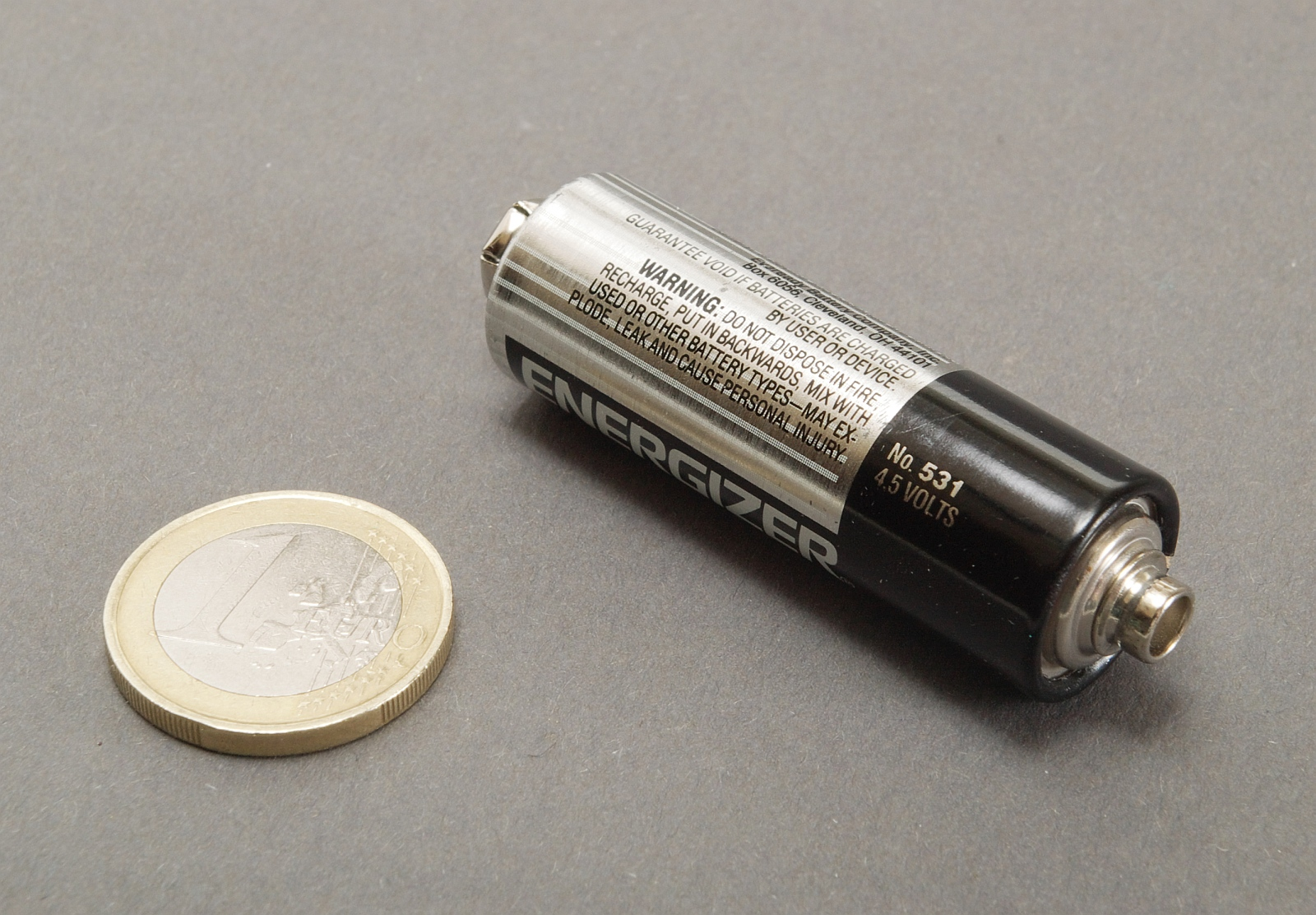 Fotobatterie Typ 531, 4.5 Volt für Polaroid Land Kameras.